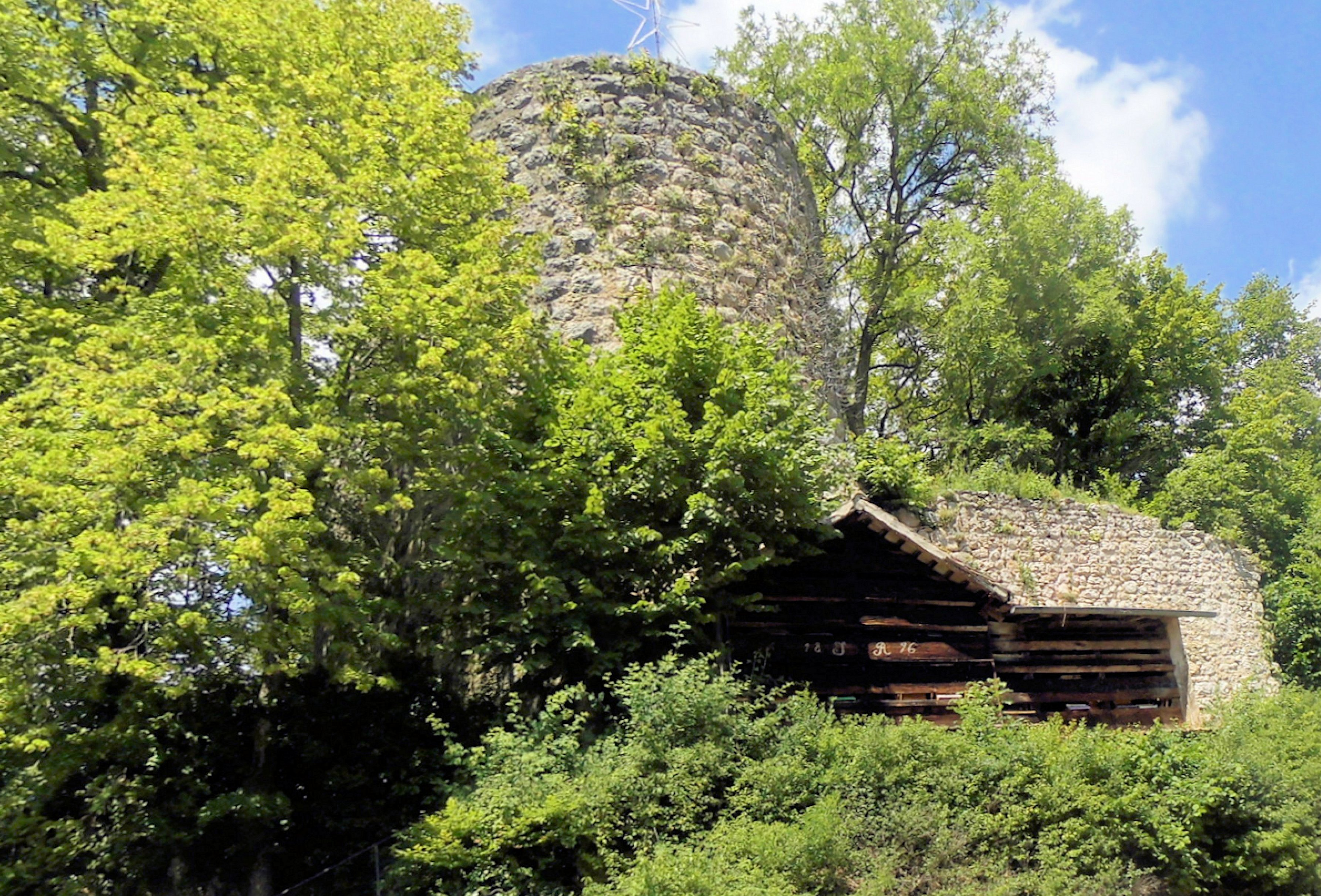 Les vestiges du château de Liebenstein à Liebsdorf